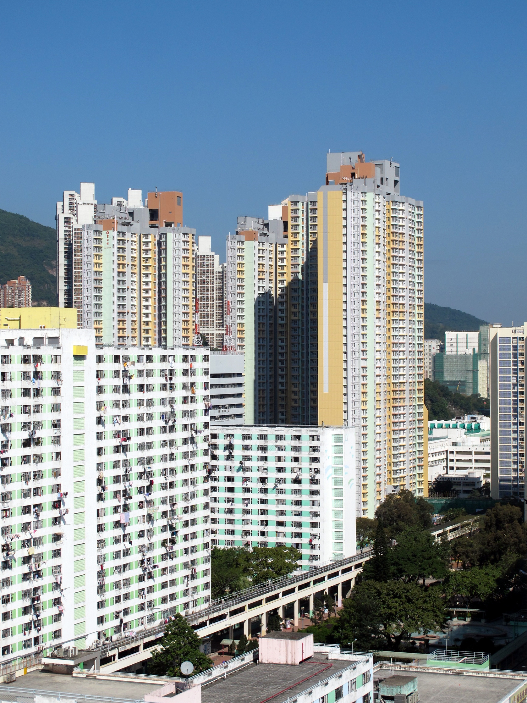 Fung Wo Estate 豐和邨